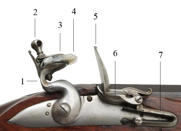 Кремнёвый замок